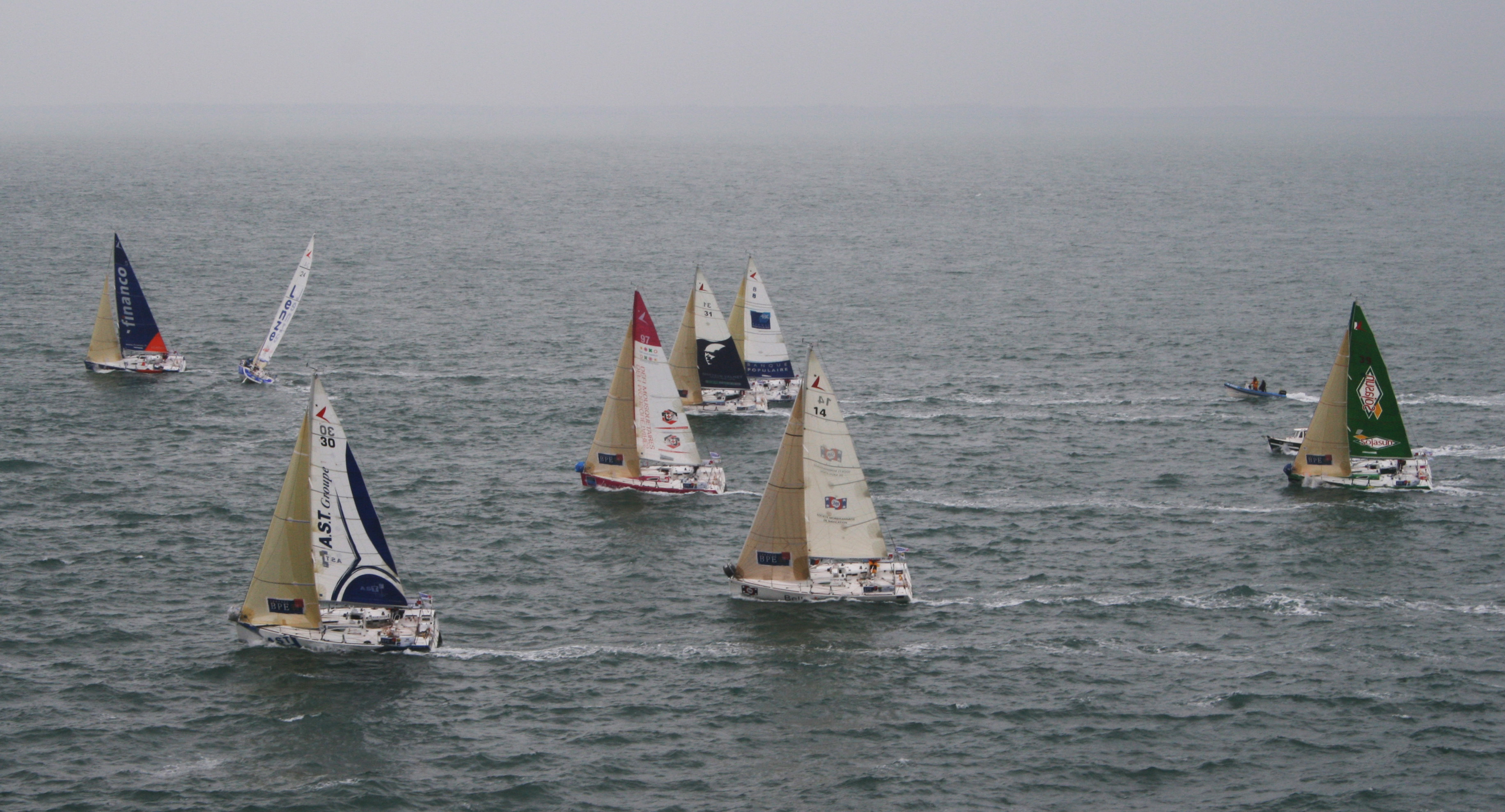 Trophee BPE à Belle-Ile